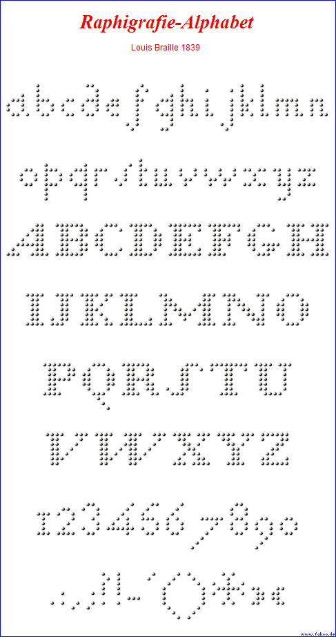 Raphigrafie-Alphabet von Louis Braille 1839 zur Darstellung der lateinischen Buchstaben, Ziffern und Satzzeichen mittels Punkten in einem Raster